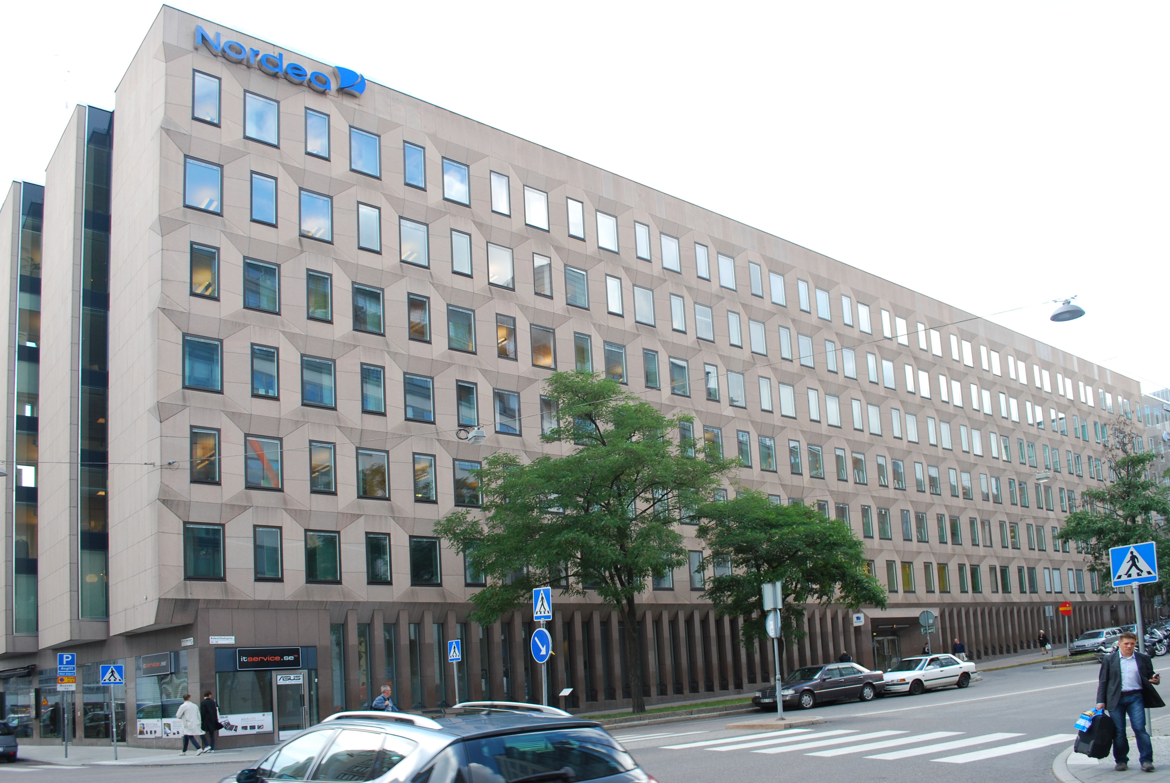 Nordeas huvudkontor i kvarteret Putten 15